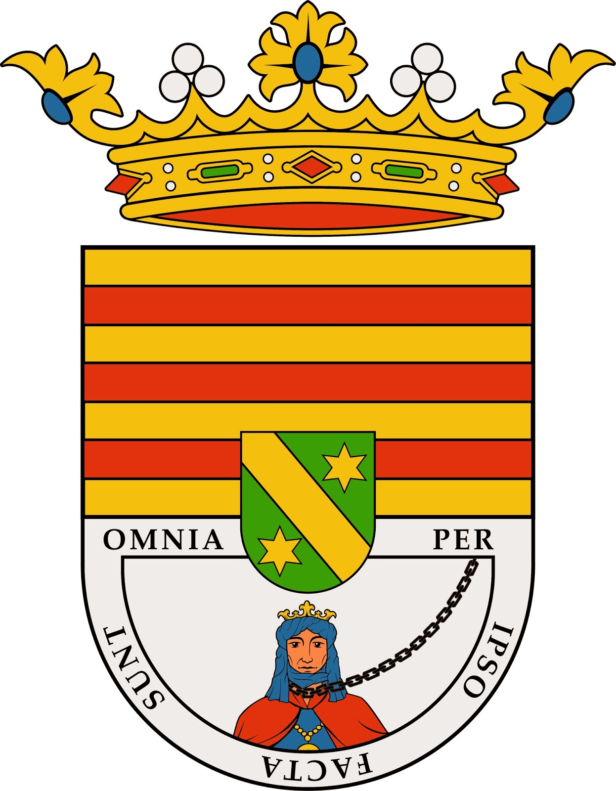 Escudo de Armas del Marquesado de Arcicóllar